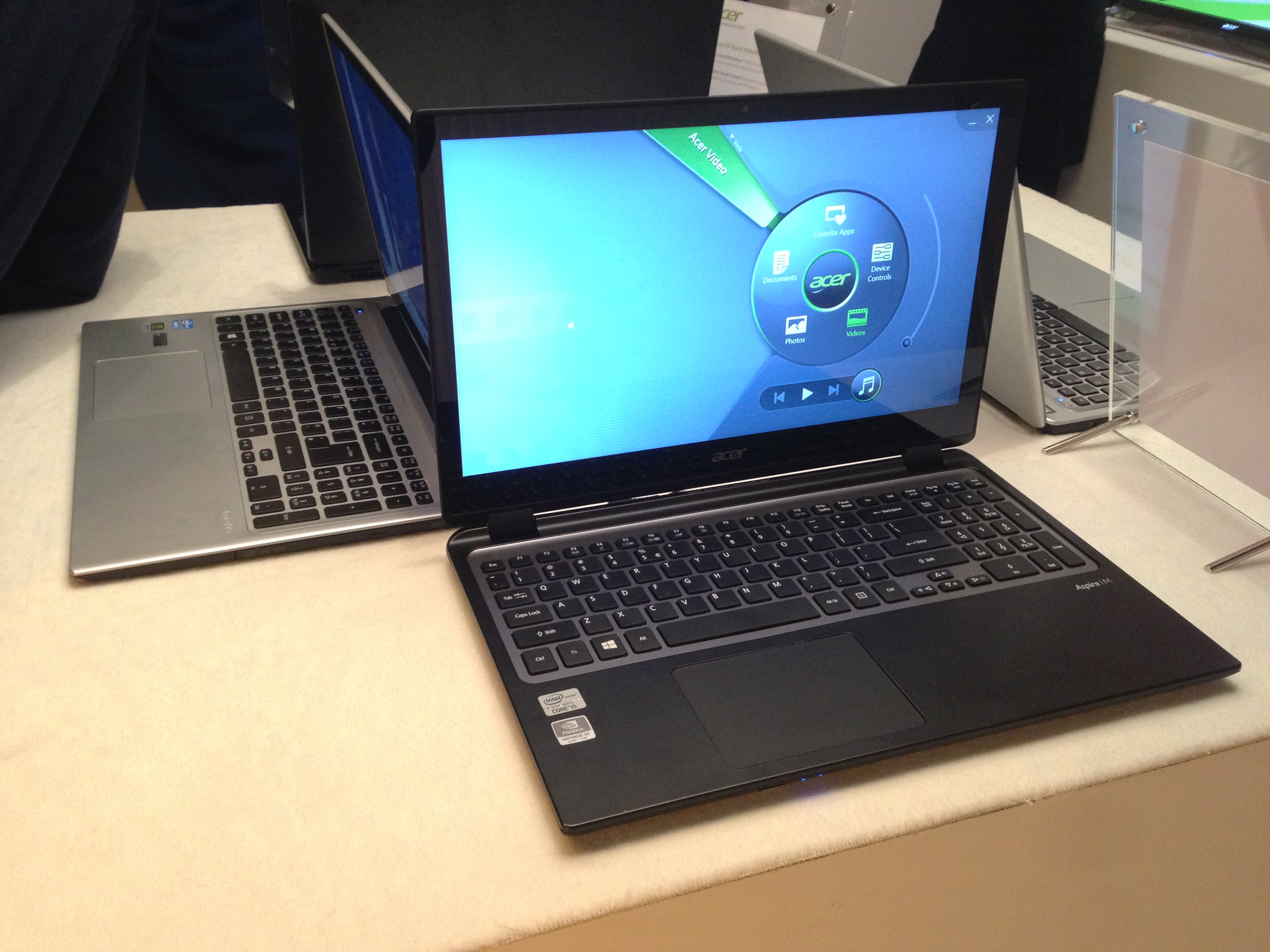 Acer Aspire M